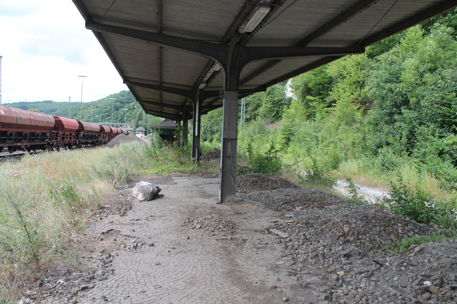 Der stillgelegte Bahnstein am Bahnhof Dillenburg